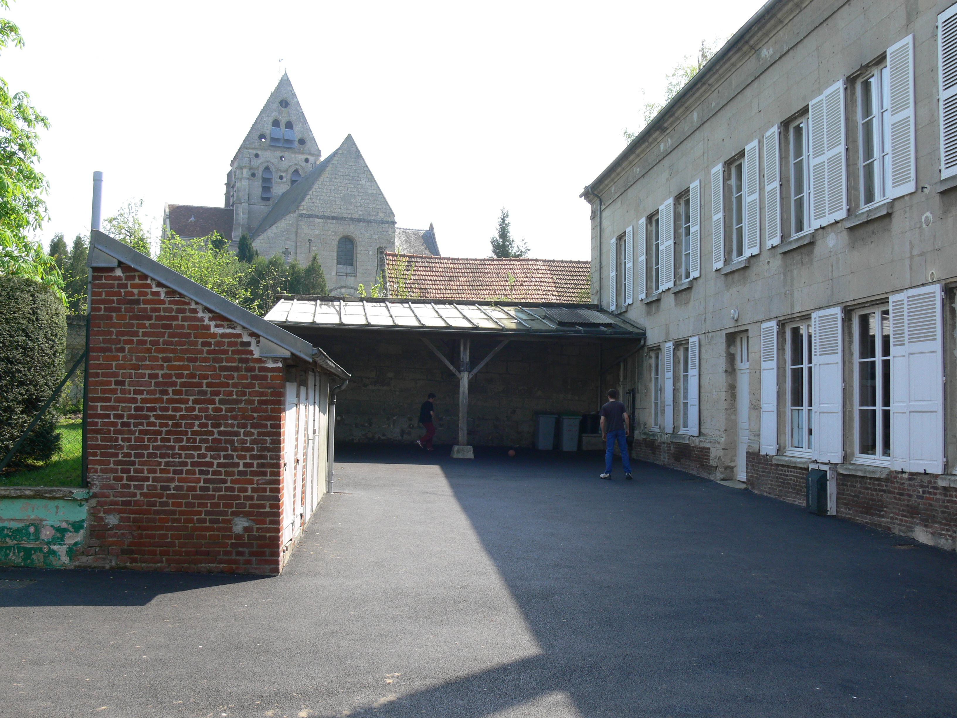 eglise vue de derriere l'ecole